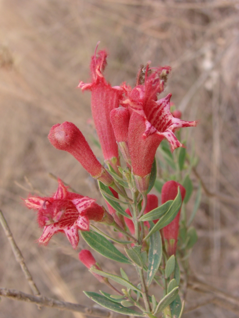 Esterhazya nanuzae - OROBANCHACEAE - Parque Estadual do Biribiri - Serra do Espinhaço - Diamantina - Minas Gerais - Brasil.